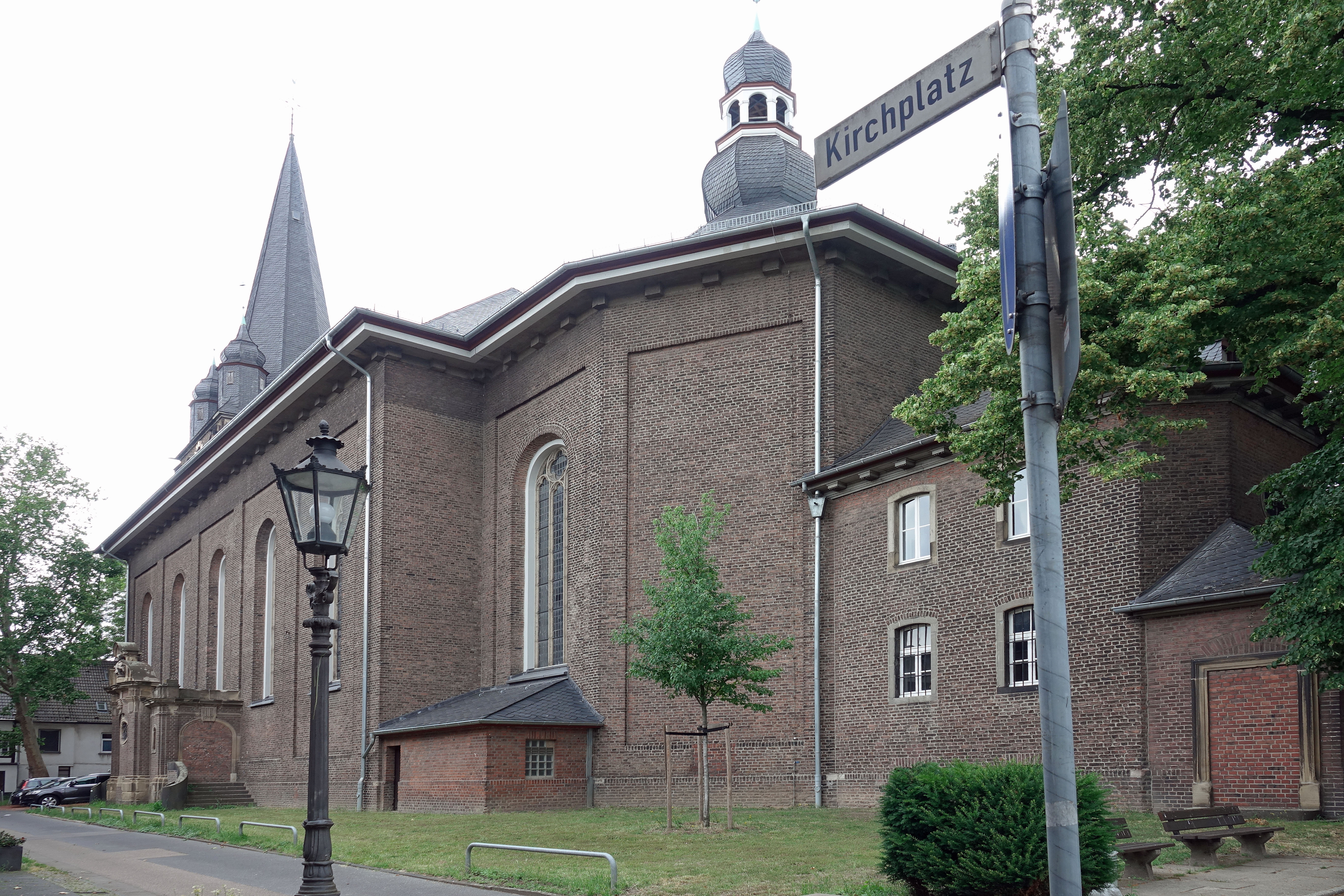 St. Peter (Uerdingen) - Rückseite